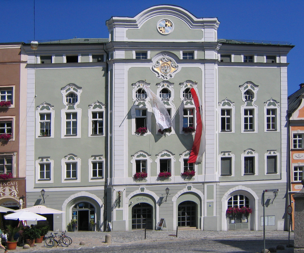 Burghausen Rathaus Canon IXUS II